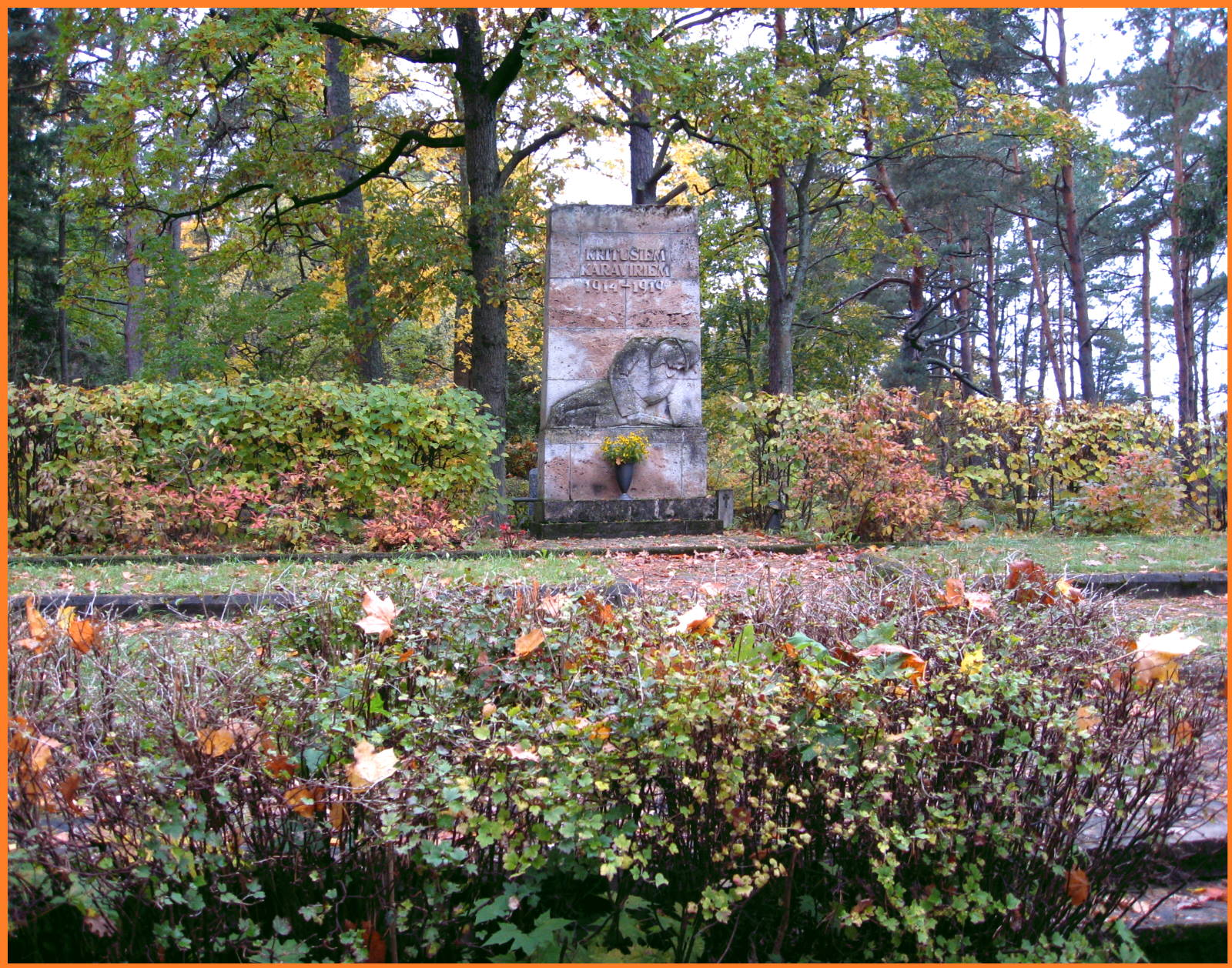 1914.-1919.g.kritušo karavīru apbēdīšanas vieta Asaru kapos